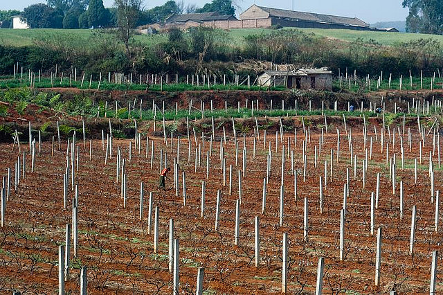 Vignoble dans le Yunnan, au climat subtropical, avec des vignes perchées à 1500 mètres d'altitude